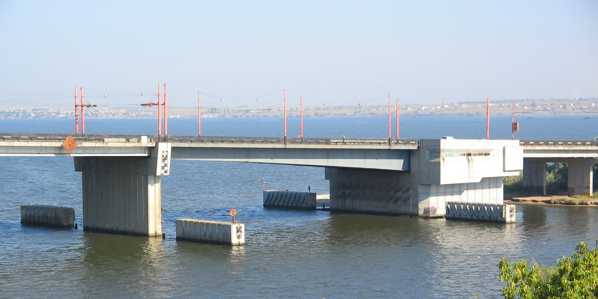 Ингульский мост (Николаев)